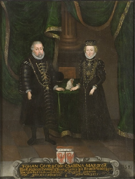 Johann Georg, Kurfürst von Brandenburg (1525-1598) und seine zweite Gemahlin Sabina, Markgräfin von Bayreuth (1529-1575). Sammlung Gripsholm.